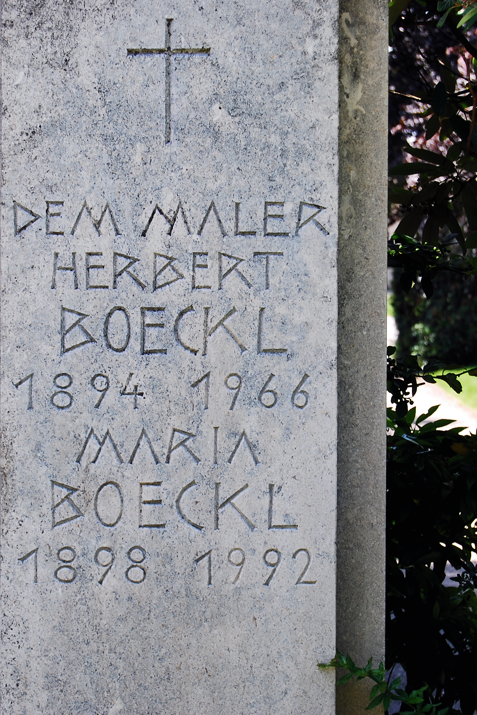 Grab des Malers Herbert Böckl